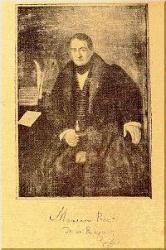 Imatge de Marià Peset de la Raga (1780-1848), metge valencià que fou perseguit a principis del segle XIX, en els temps de l'absolutisme, per les seues idees liberals.